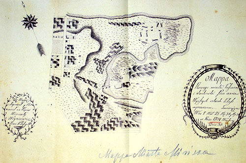 Беларуская (тарашкевіца): Плян Новага Места, Менск